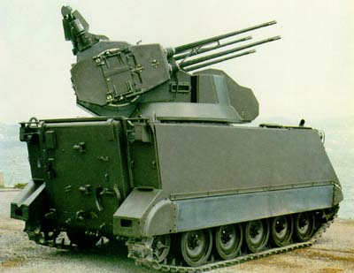 Sistema contraereo SIDAM, Esercito italiano